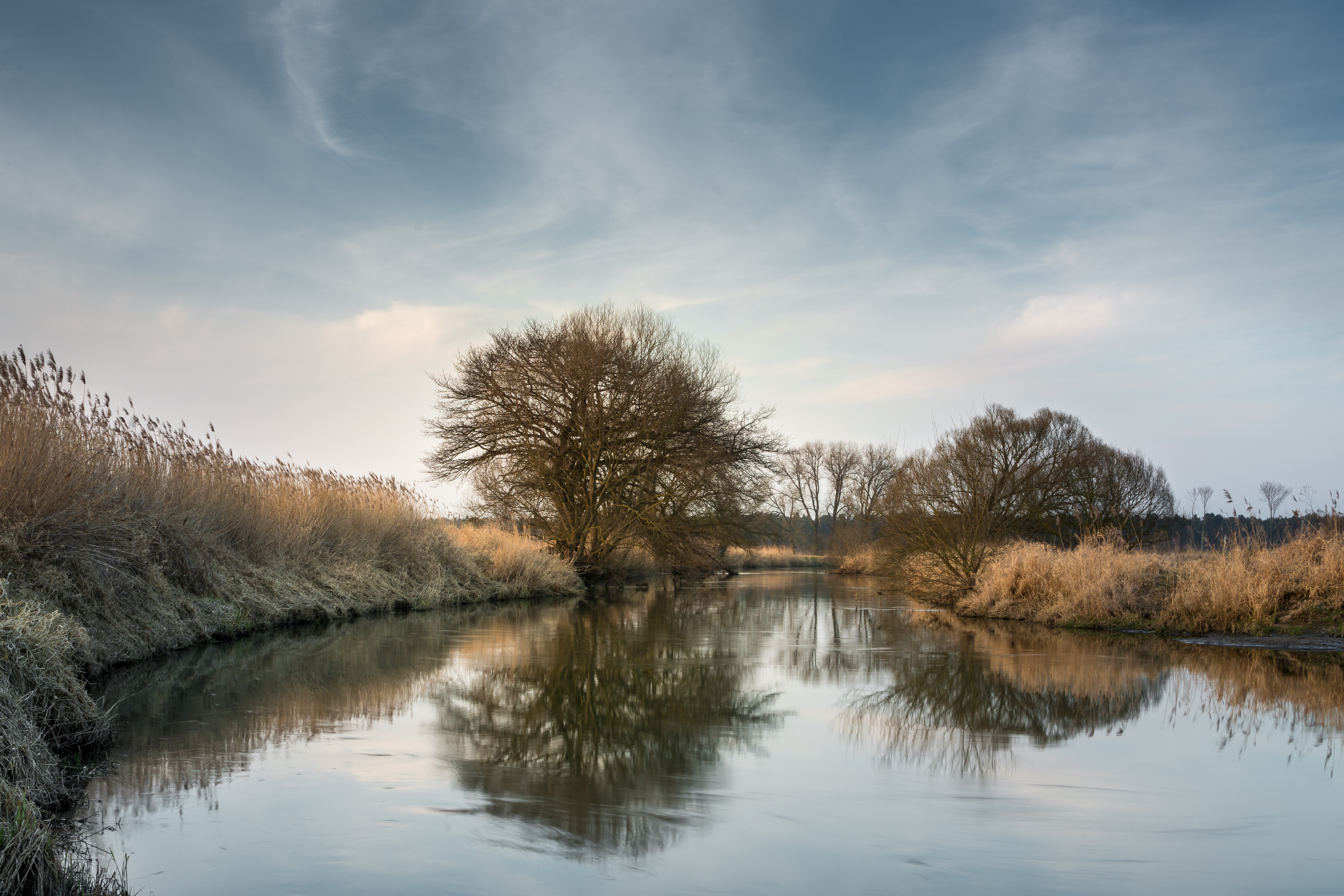 Okeraue bei Volkse (Nahe Meinersen, Niedersachsen) an einem Frühlingsabend.